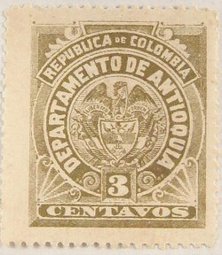 Antioquia stamp